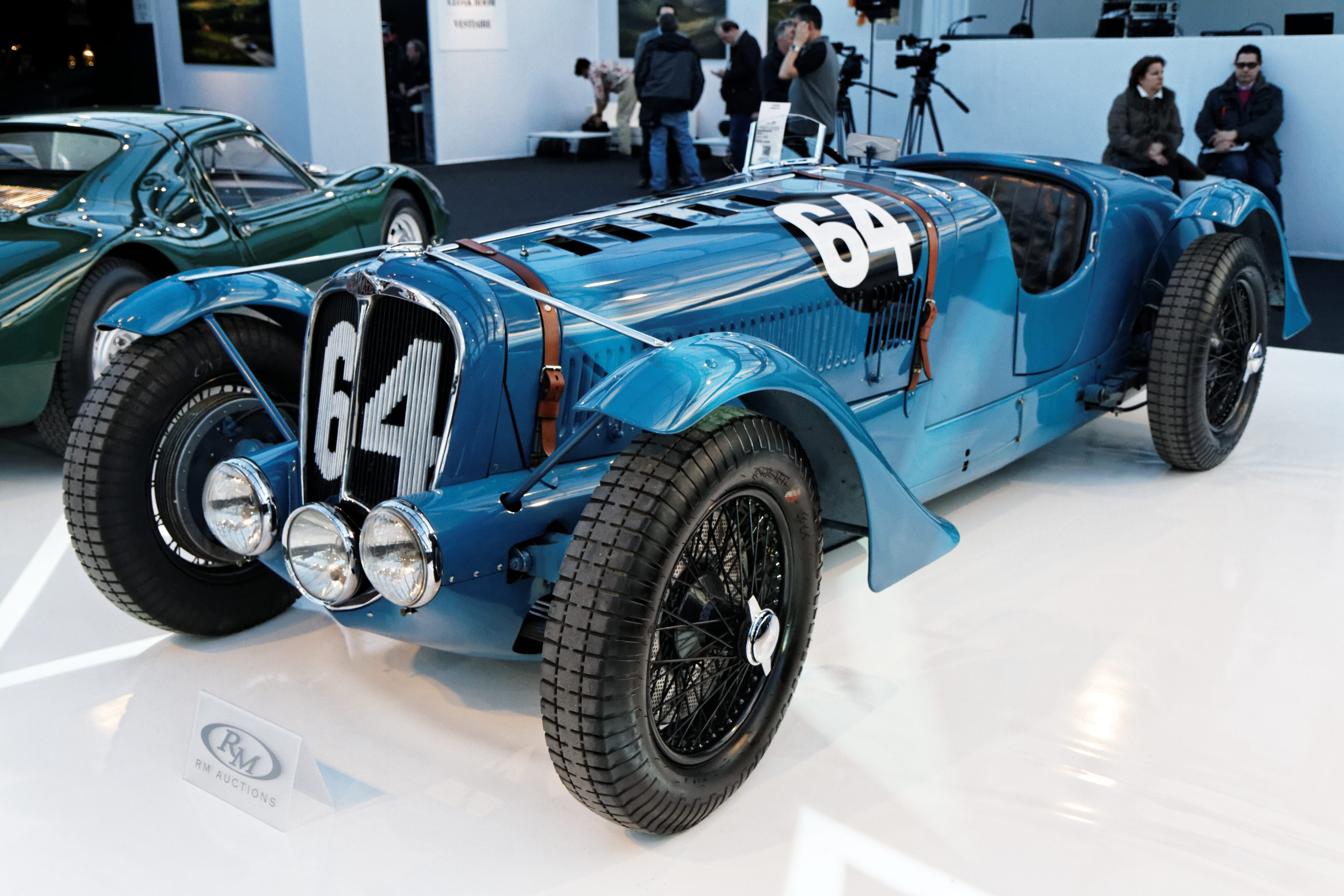 Une Delahaye 135 S de 1936.